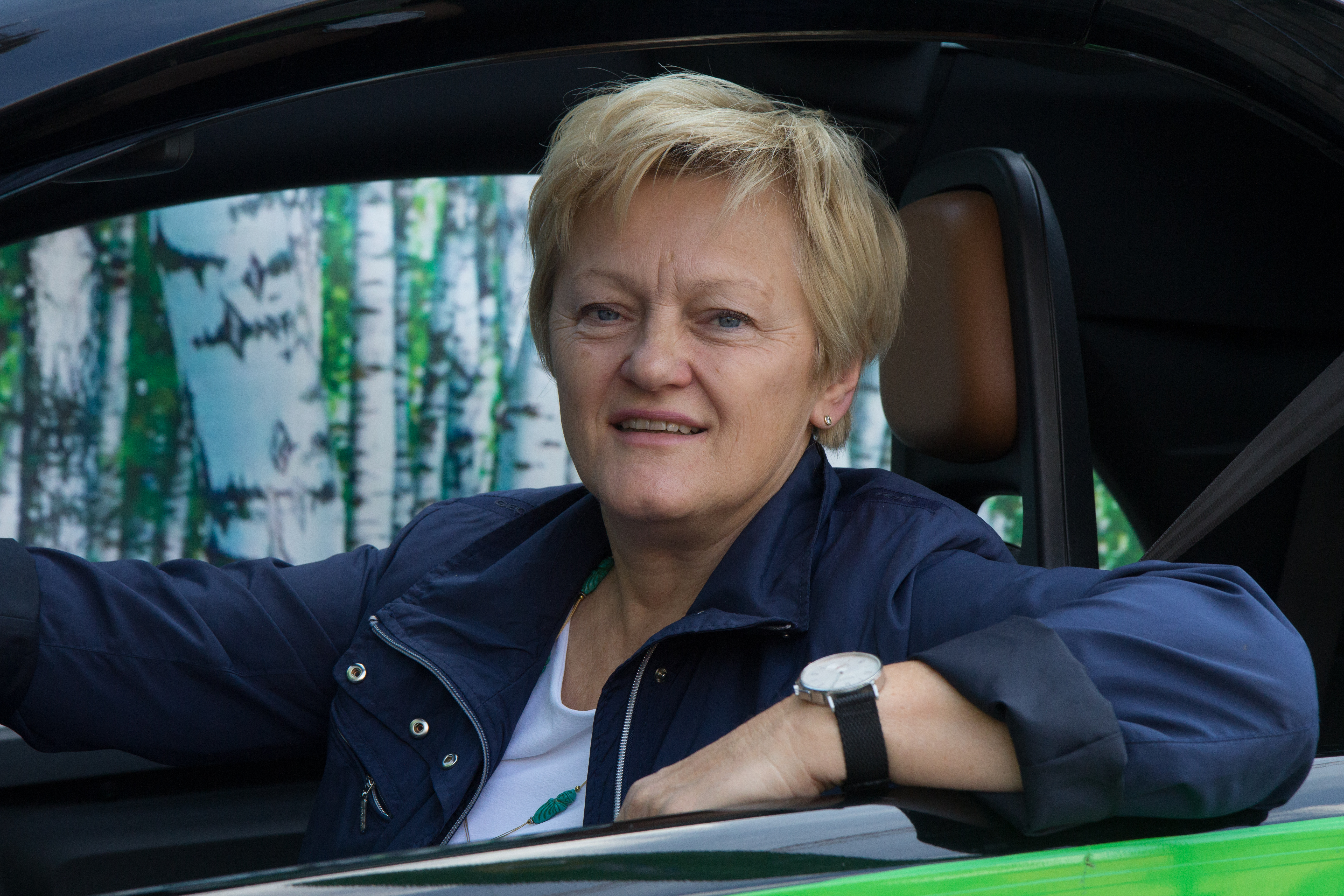 Renate Künast im Rahmen des Länderrates der GRÜNEN am 17. September 2017 in Berlin (Gasometer Schöneberg)